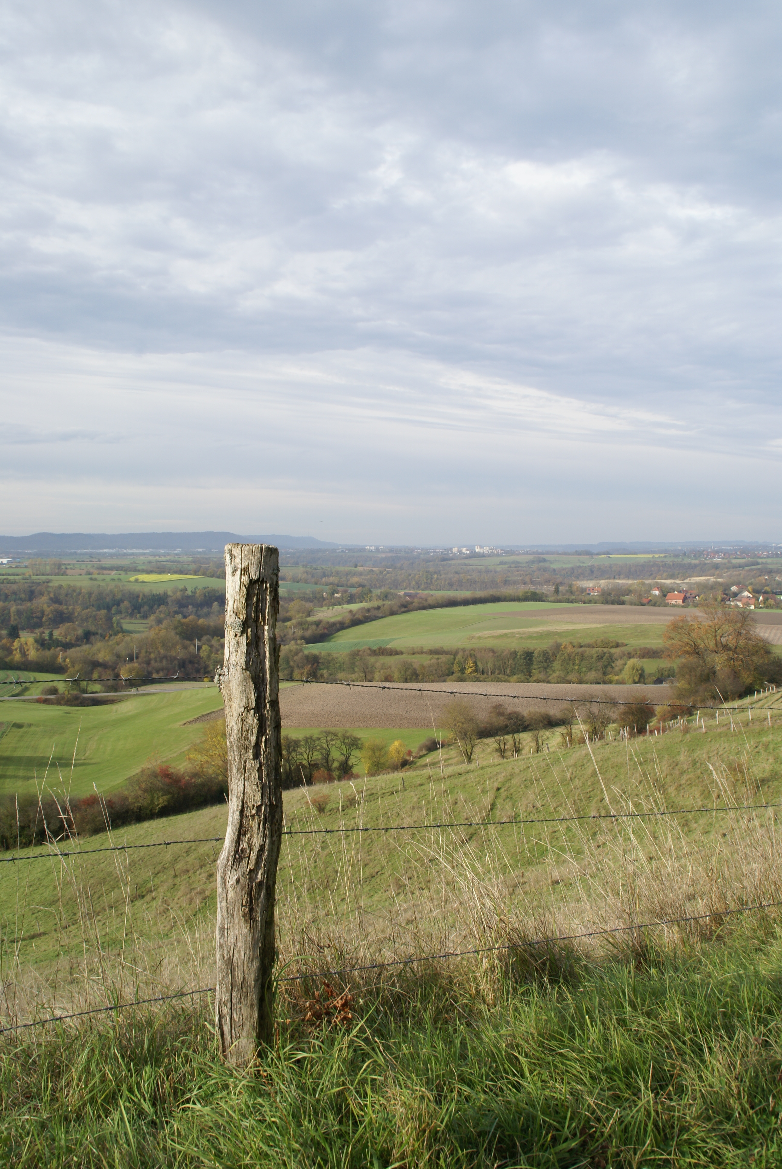 Blick vom Rand der Limpurger Berge bei Michelbach an der Bilz über das westliche Schwäbisch Hall bis zum Friedrichsberg bei Waldenburg